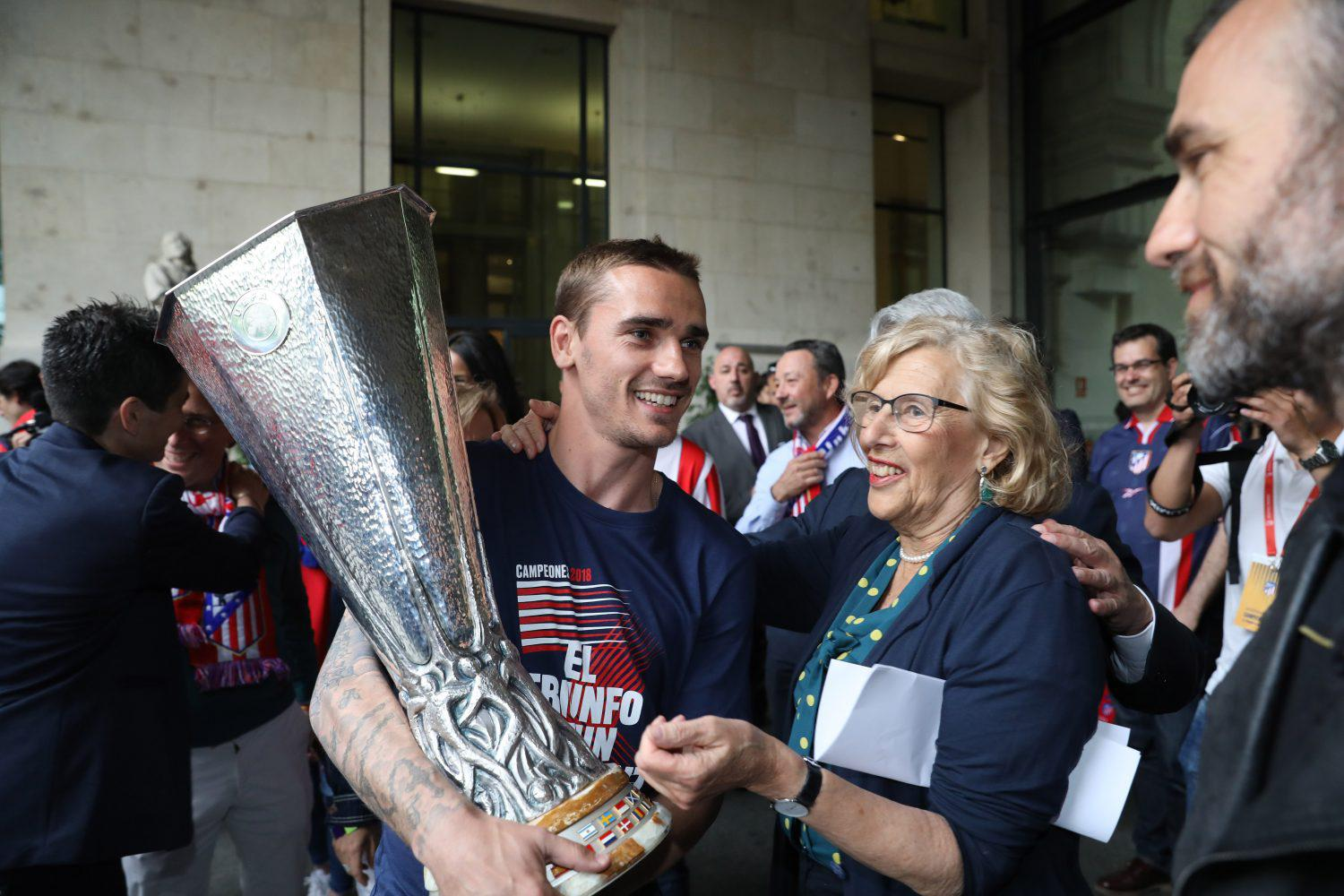 La alcaldesa de Madrid, Manuela Carmena, acompañada por buena parte de la Corporación municipal, ha recibido hoy a los equipos femenino y masculino de fútbol del Atlético de Madrid, que han venido a celebrar con los madrileños los títulos de Liga femenino y de la Europe League masculino. También presentes en este emotivo acto el presidente del club Enrique Cerezo, el consejero delegado Miguel Ángel Gil Marín y su junta directiva.